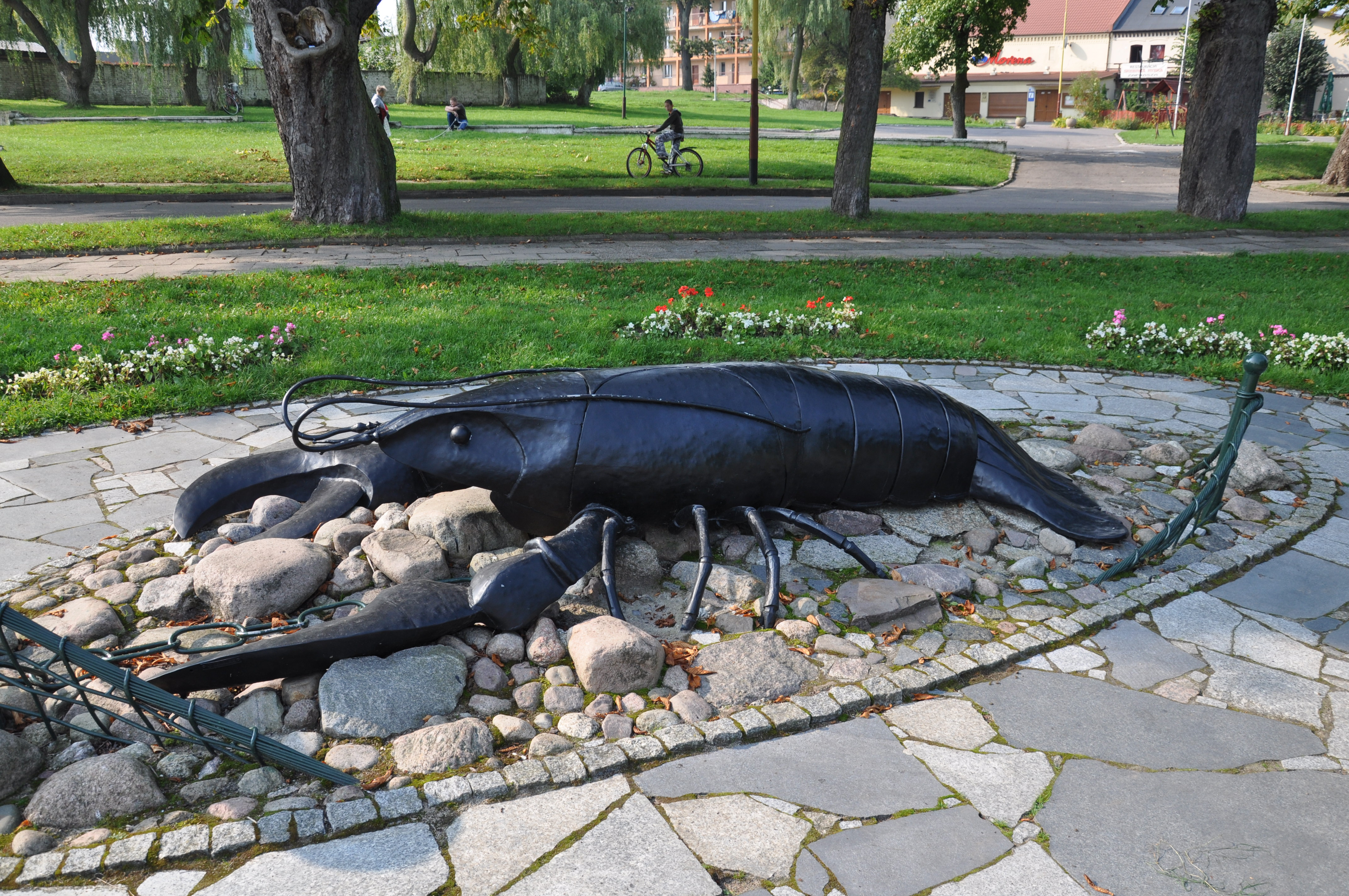 Ińsko - pomnik raka